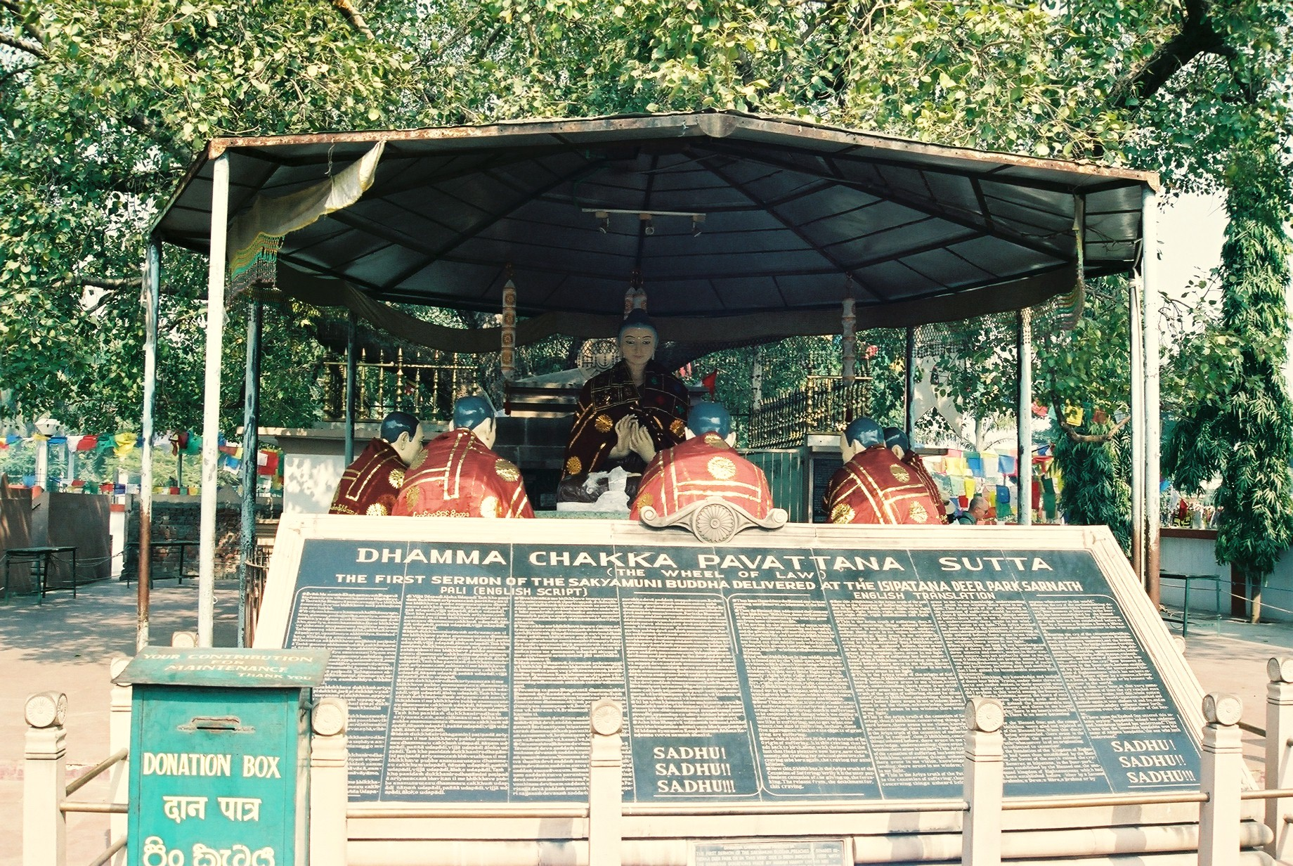 初転法輪の像。 解説を書いた看板(？)で見えていませんが、5人の比丘はスリランカ式にオネエ座りをしています。(笑) (2005/01/27 Sarnath, Uttar Pradesh, INDIA)